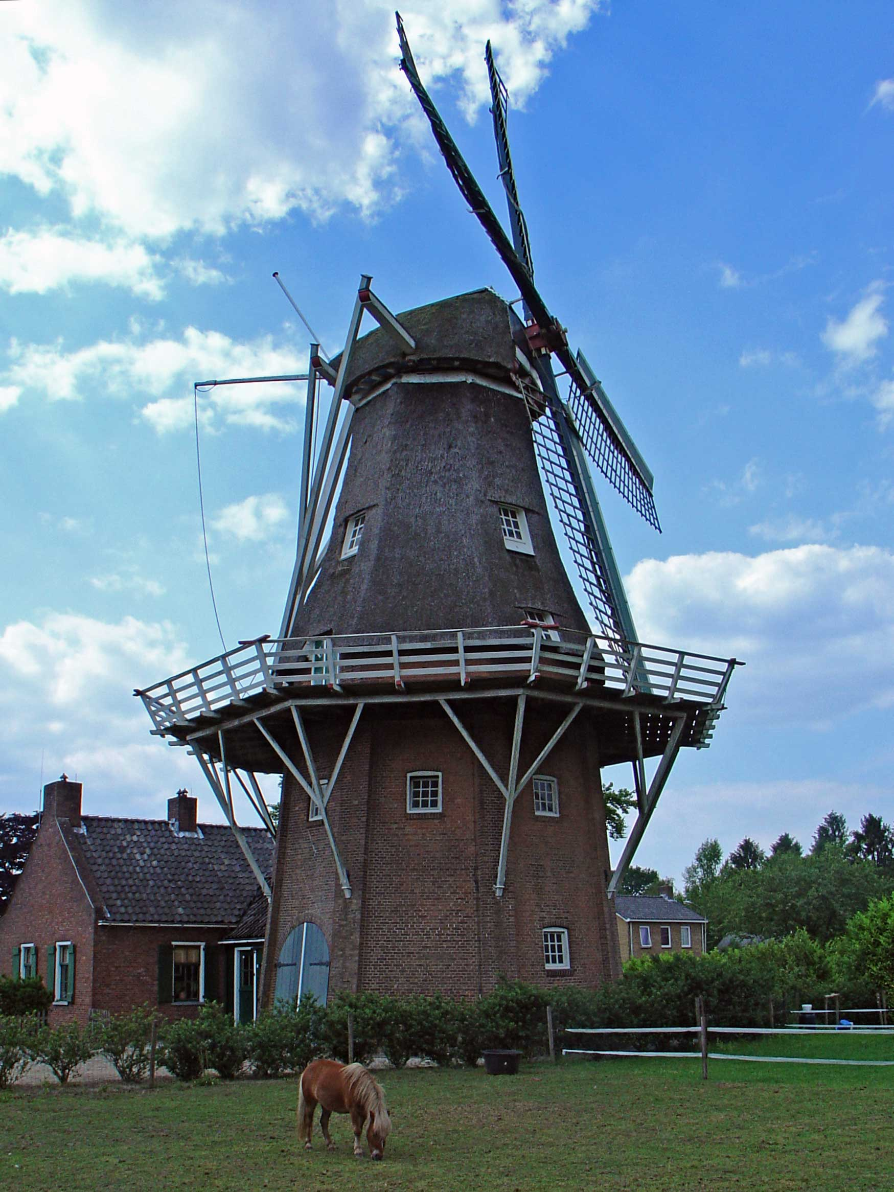 molen Noordenveld in Norg